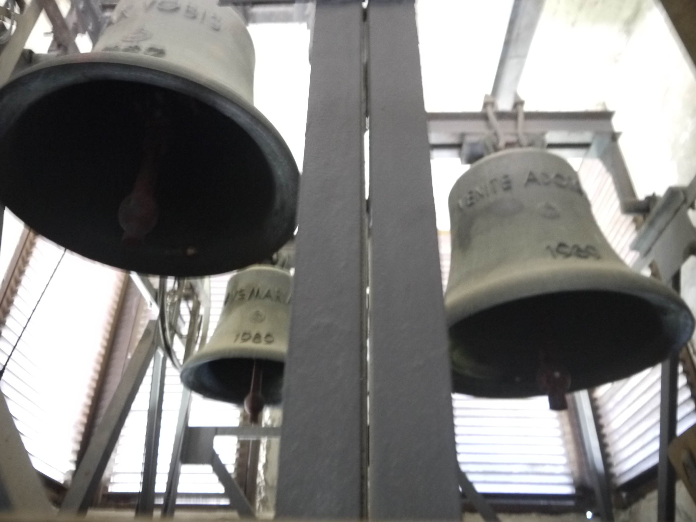 Die Glocken der katholischen Heilig-Kreuz-Kirche in Berlin-Hohenschönhausen.